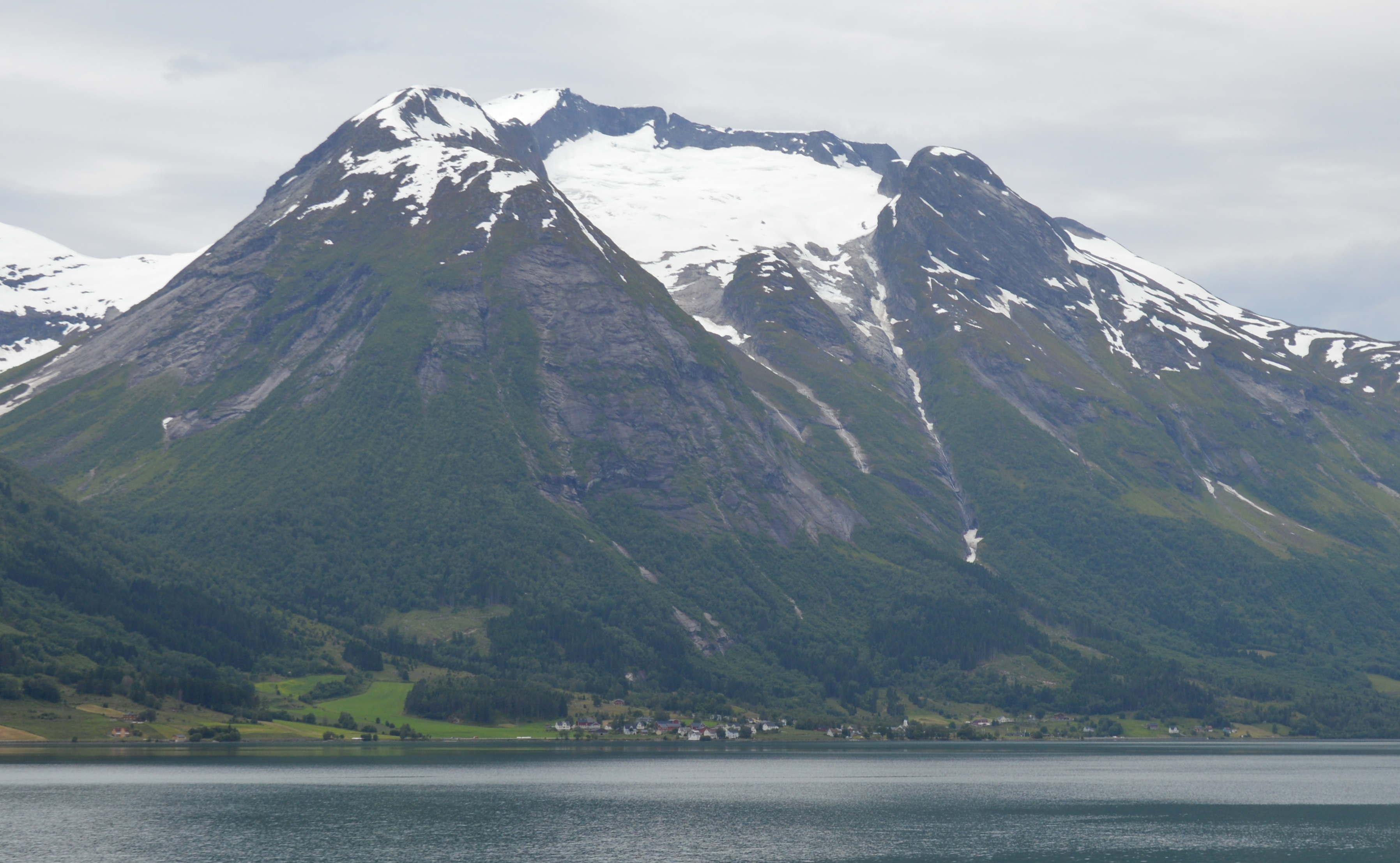 Oppstryn